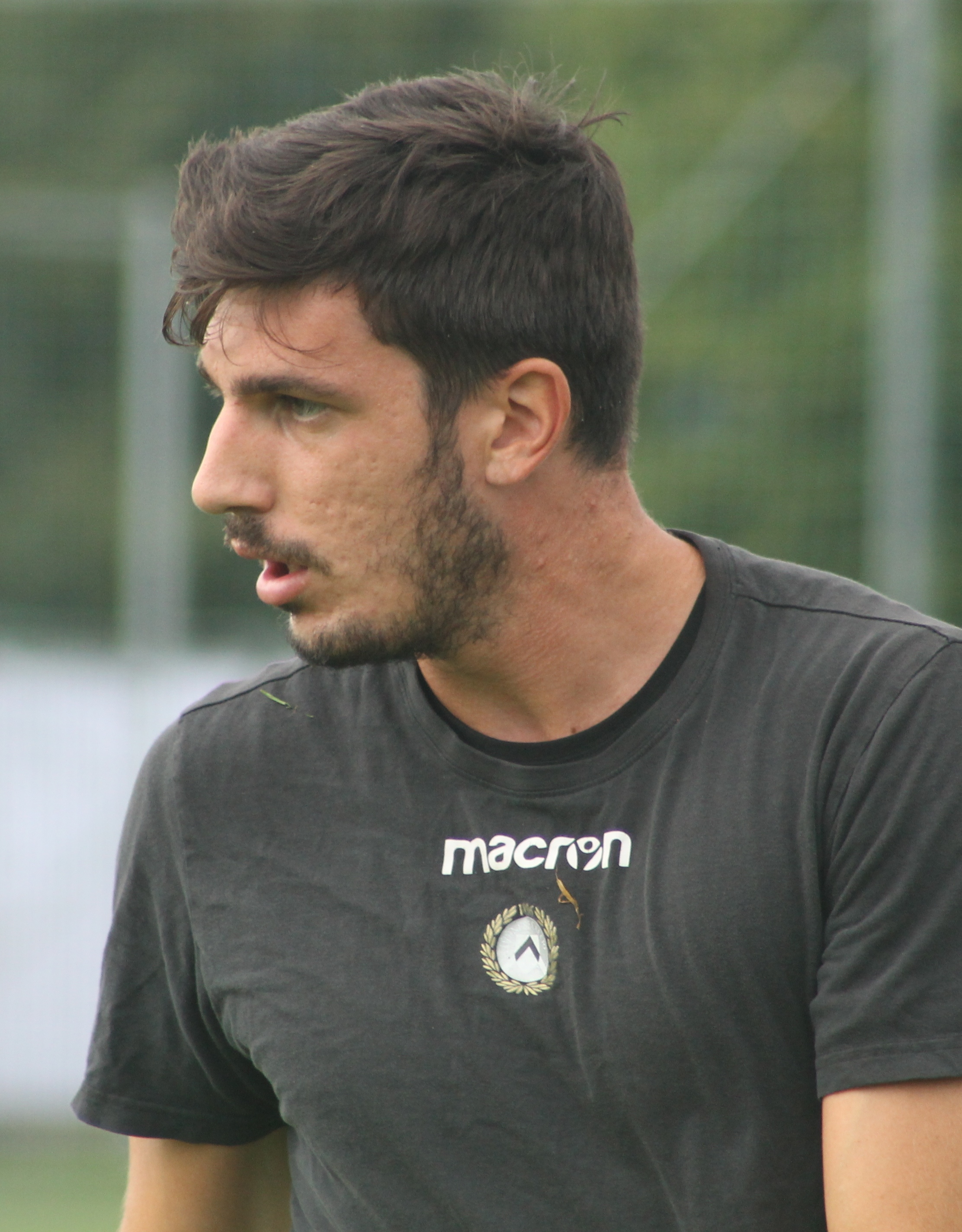 Simone Scuffet durante una seduta d'allenamento nel ritiro di St. Veit dell'Udinese.